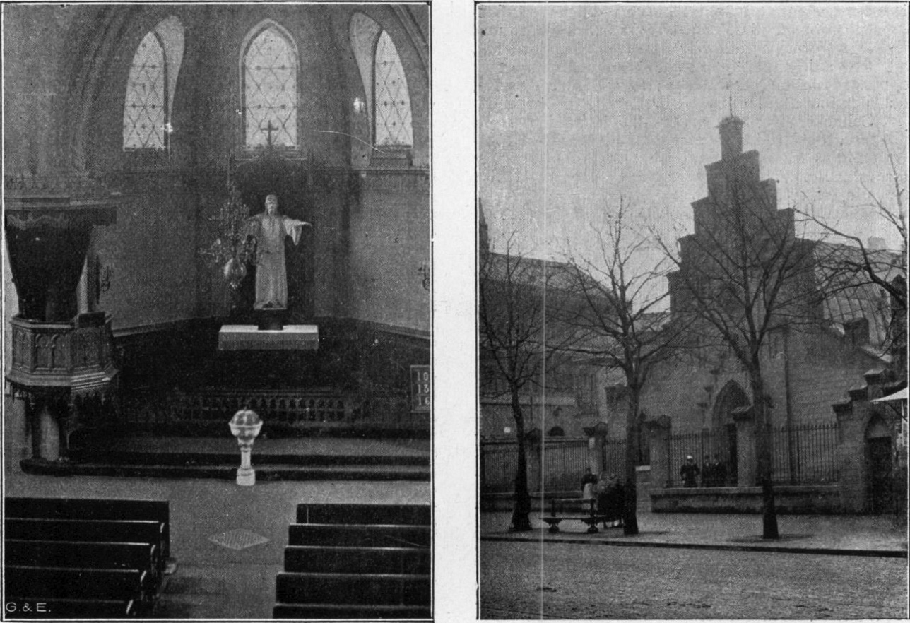 Svensk kyrkan (Sofiakyrkan) på Boulevard Ornano 19. Paris. Fasadritningar utförda 1878 av Fredrik Wilhelm Scholander